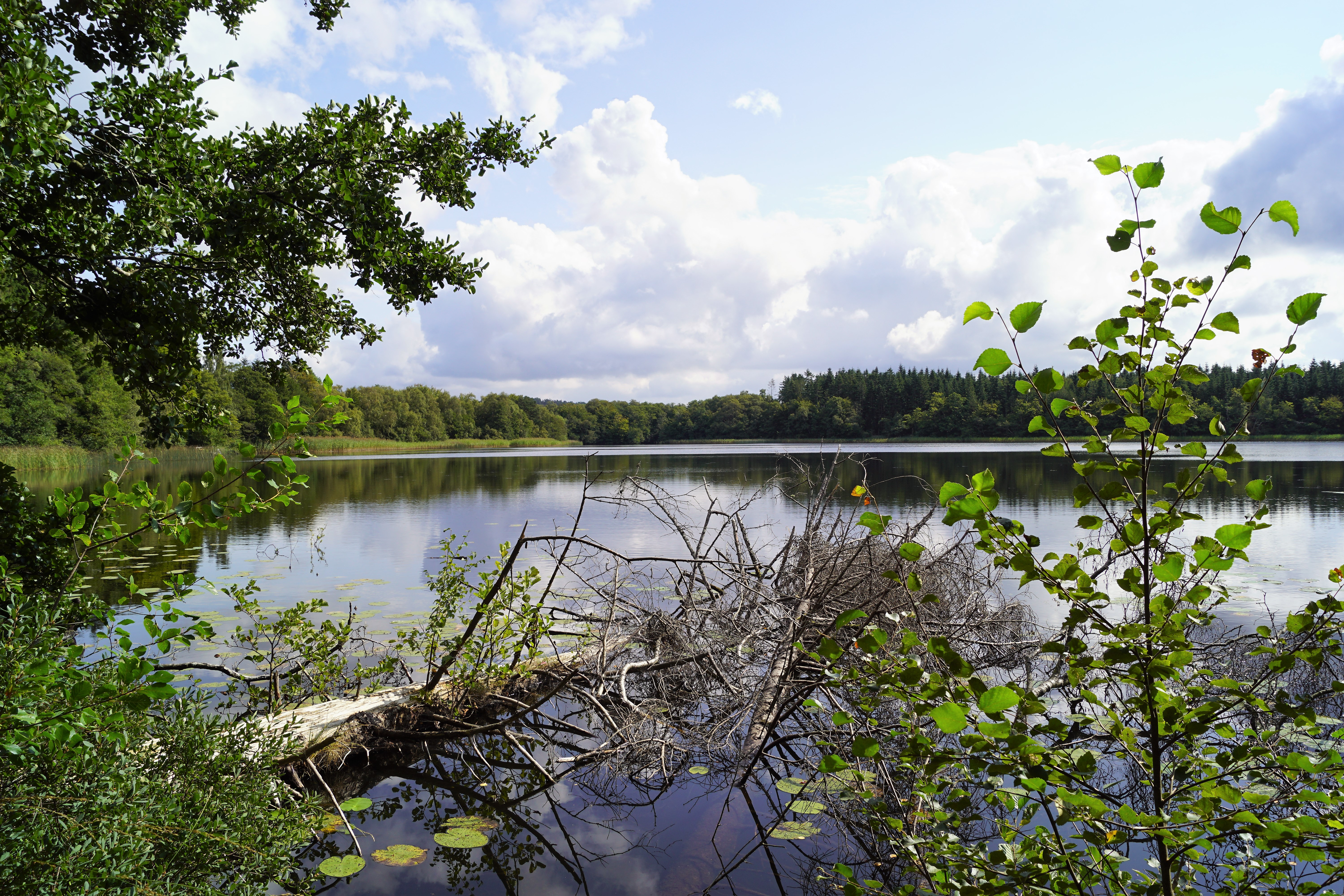 Vejlsø set mod øst